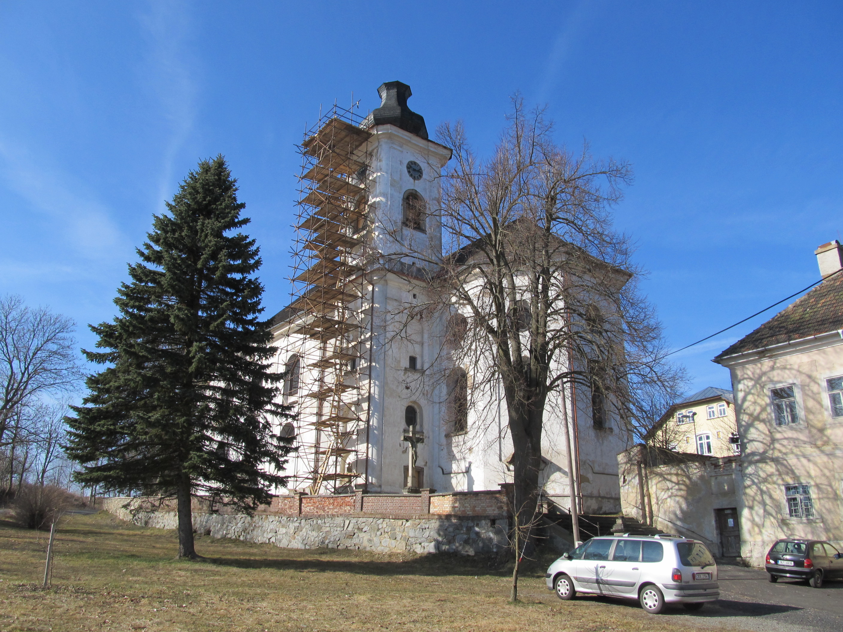 Mnichov - kostel svatého Petra a Pavla